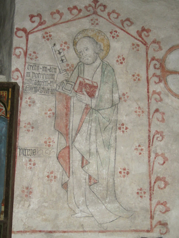 Finströms kyrka Aposteln Petrus